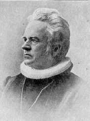 Johan Willoch Erichsen, norwegian bishop